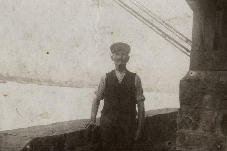 Wahrschauer Philipp Schraderder im Dienst auf dem Mäuseturm bei Bingerbrück